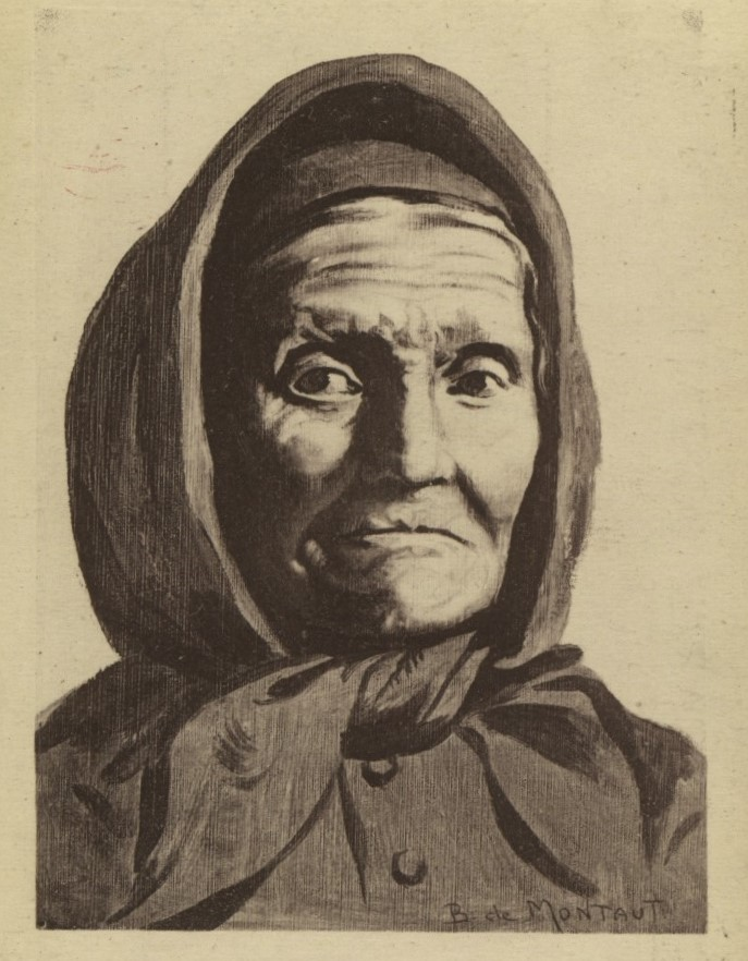 Une Béarnaise / Montaut